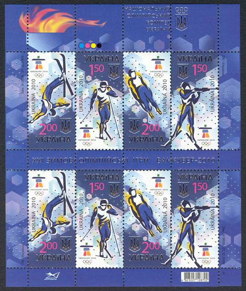 Марки України «XXI зимові Олімпійські ігри. Ванкувер-2010»